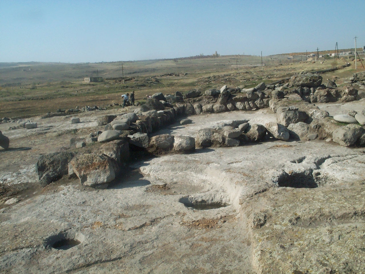 ԲՆԱԿԱՏԵՂԻ, մթա 4 հզմ. զարգացած միջնադար 4/1